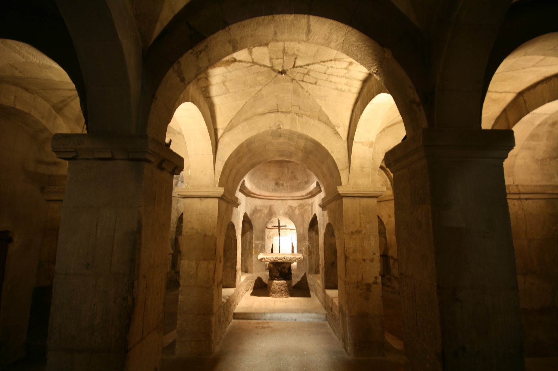 Crypte supérieure (XIe siècle) de la cathédrale Sainte-Anne d'Apt, département du Vaucluse, France. Table d'autel carolingienne